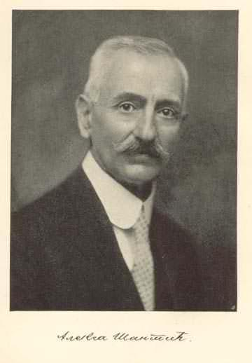 Aleksa Šantić (1868–1924), Serb poet from Herzegovina.